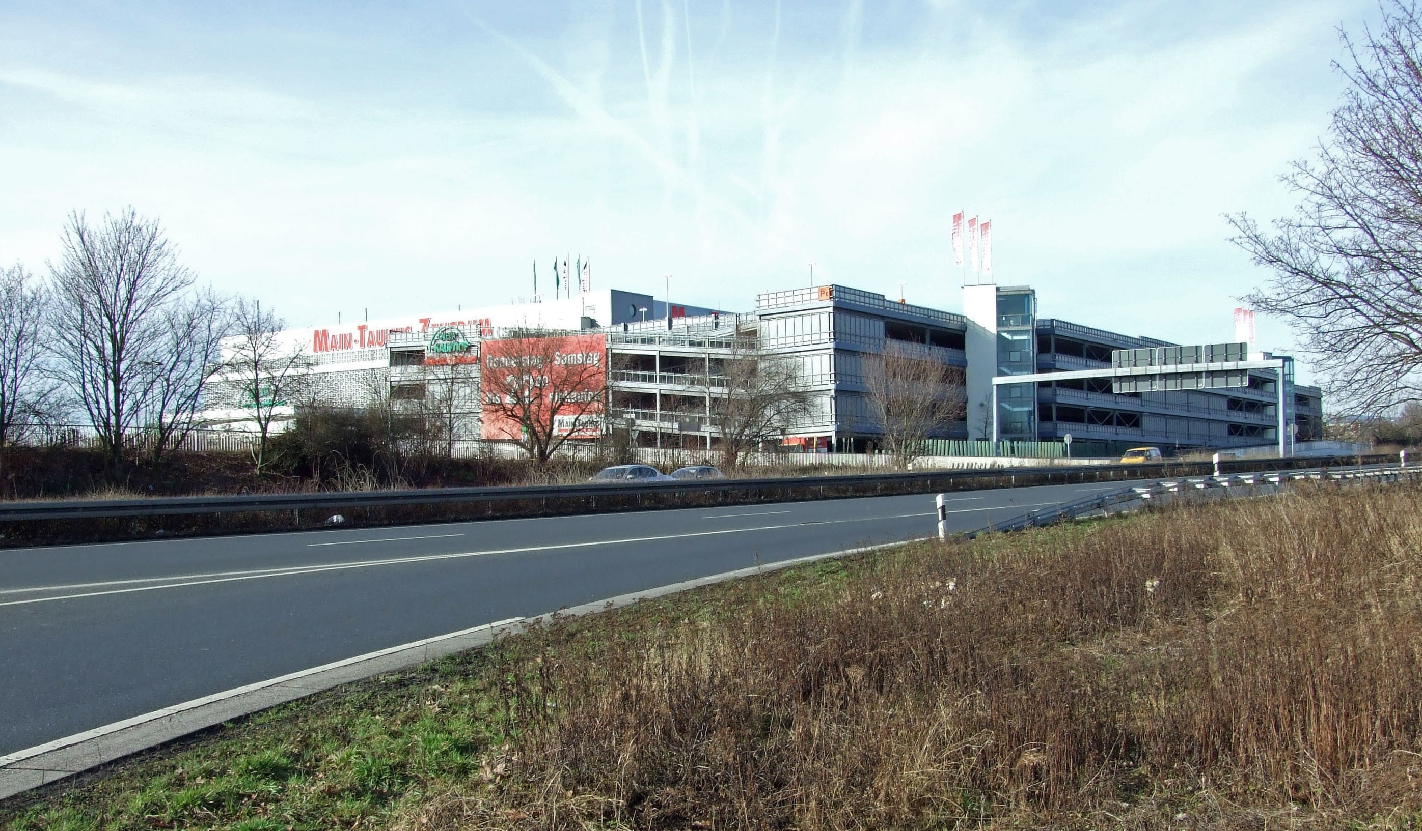 MTZ in Sulzbach